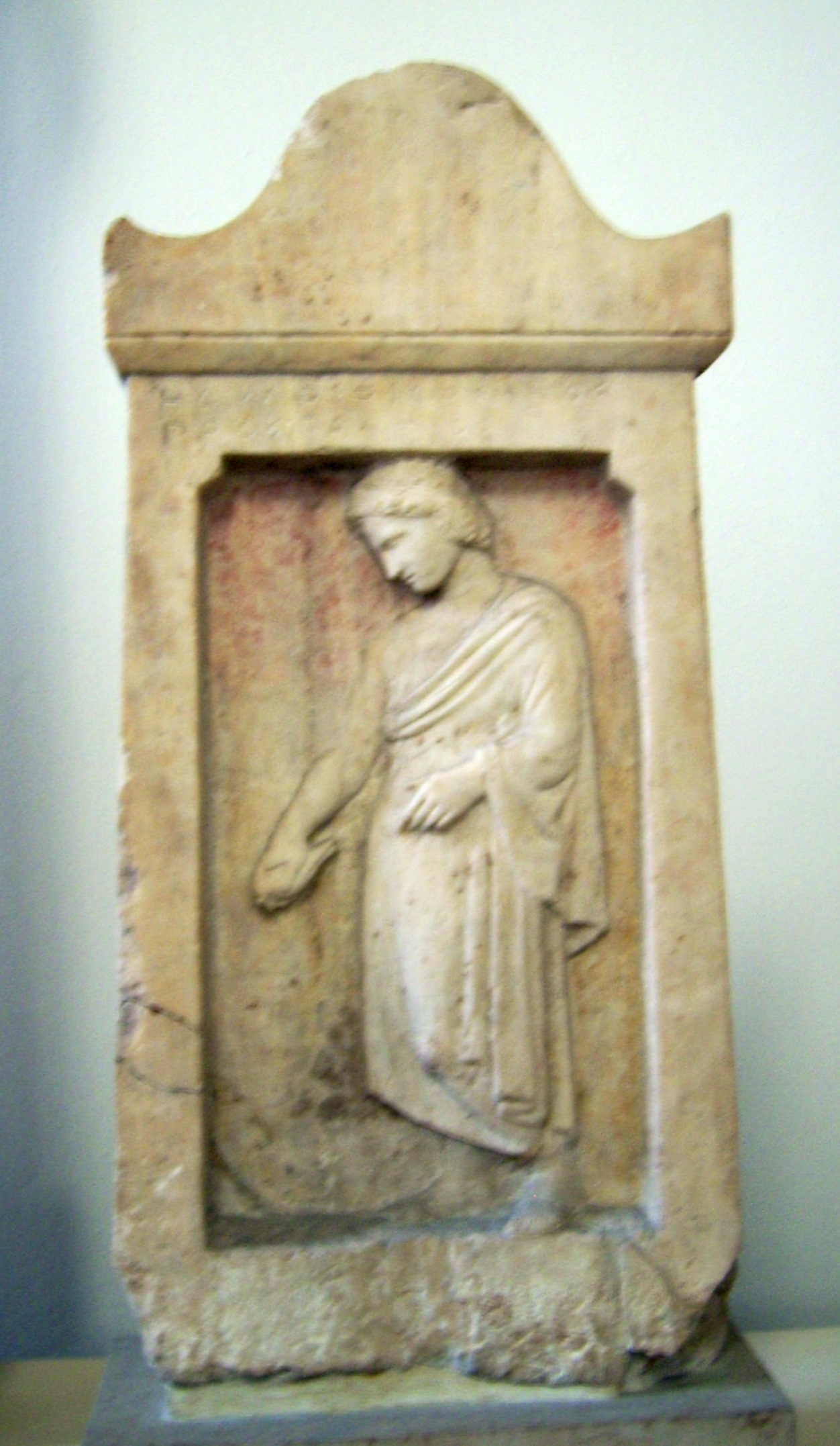 Grabstele des Hedylos, Antikensammlung Berlin im Pergamonmuseum (Sk 37)